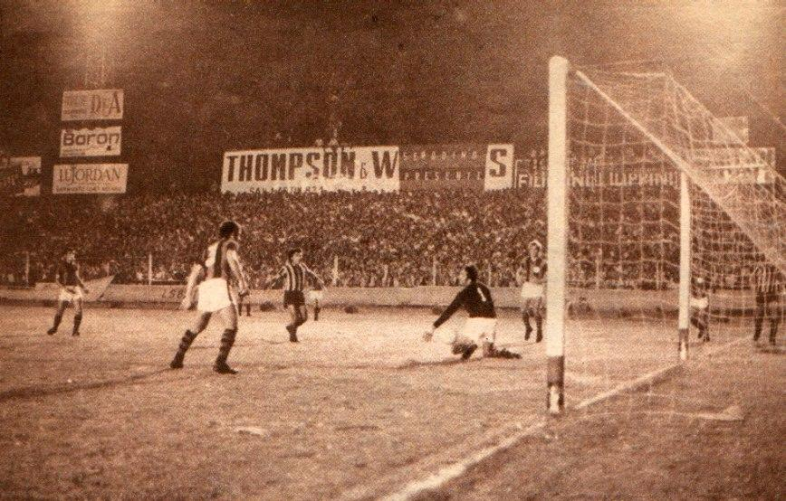 El gol de Colman para ganar el Nacional 1971